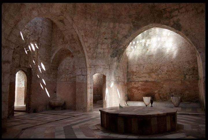 من حمامات طرابلس الأثرية